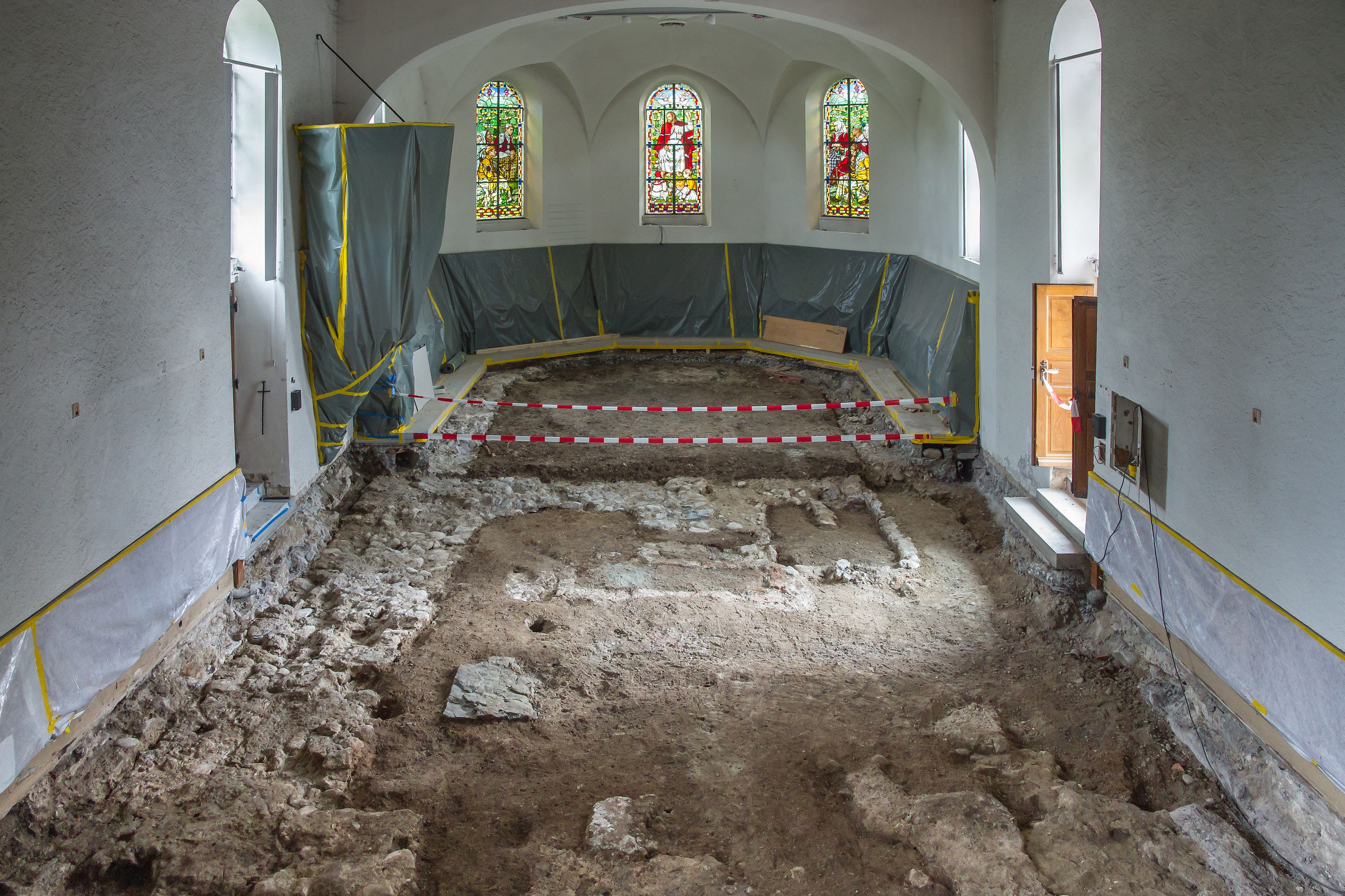 Grabungen des Archäologischen Dienstes der Kantons Bern anlässlich der Renovation der Reformierten Kirche Münsingen, Juli 2014. Es werden Fundamente und Gräber einer Vorgängerkirche freigelegt